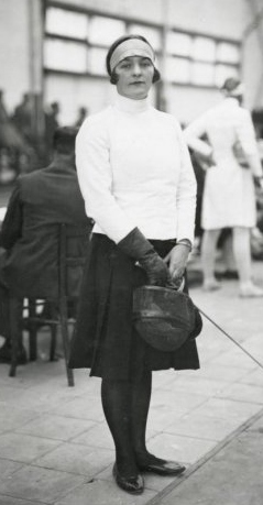 Sport. Olympische Spelen 1928 Amsterdam, Nederland. Schermen: dames, floret. Muriel B. Freeman (Engeland), zilveren medaille winnaar. Muriel in schermkleding, met floret en masker in de hand.